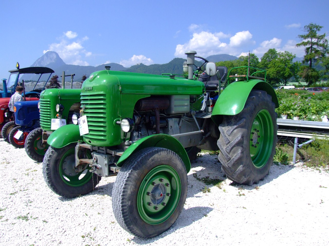 Steyr 280 mit 60 PS, Baujahr 1953